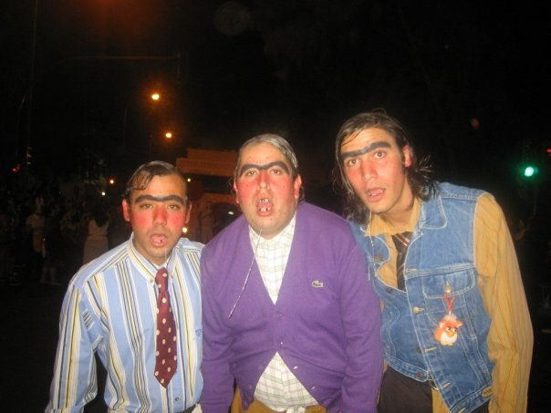 Tonto-Babas